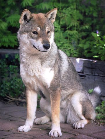 Shikoku_dog